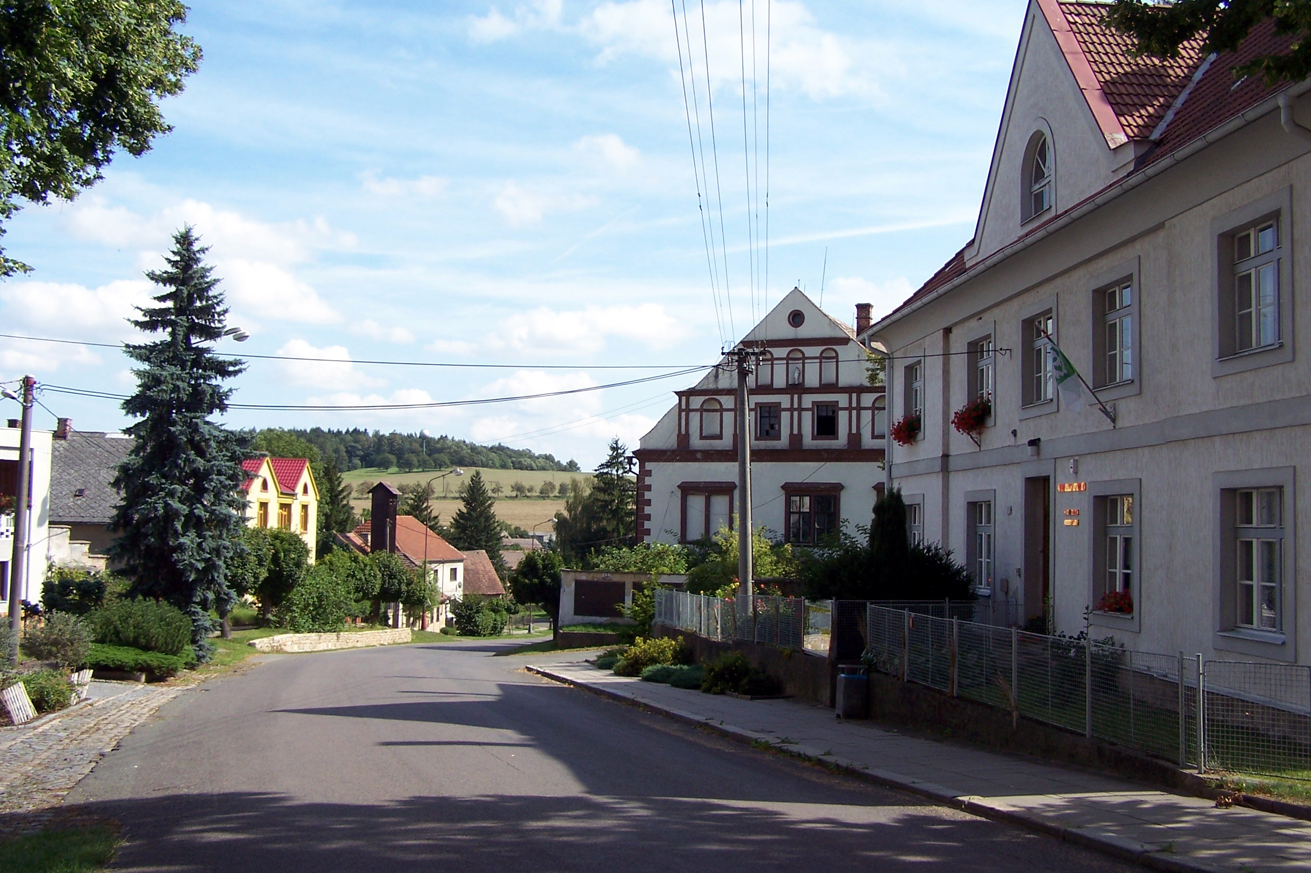 Česky: Obecní úřad v Hořiněvsy. Loc: 50°18'38.675"N, 15°45'54.906"E